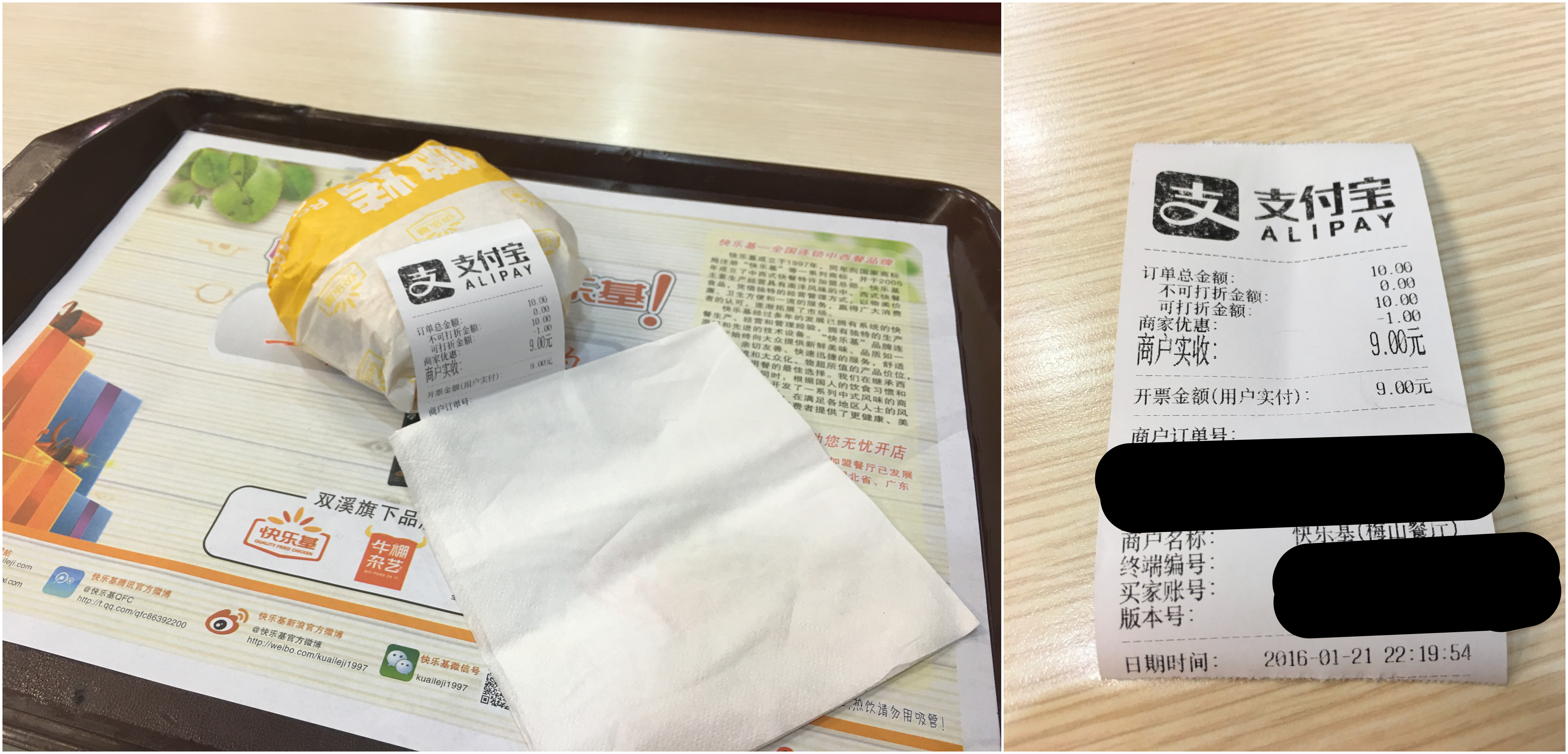 使用支付宝进行支付的快餐